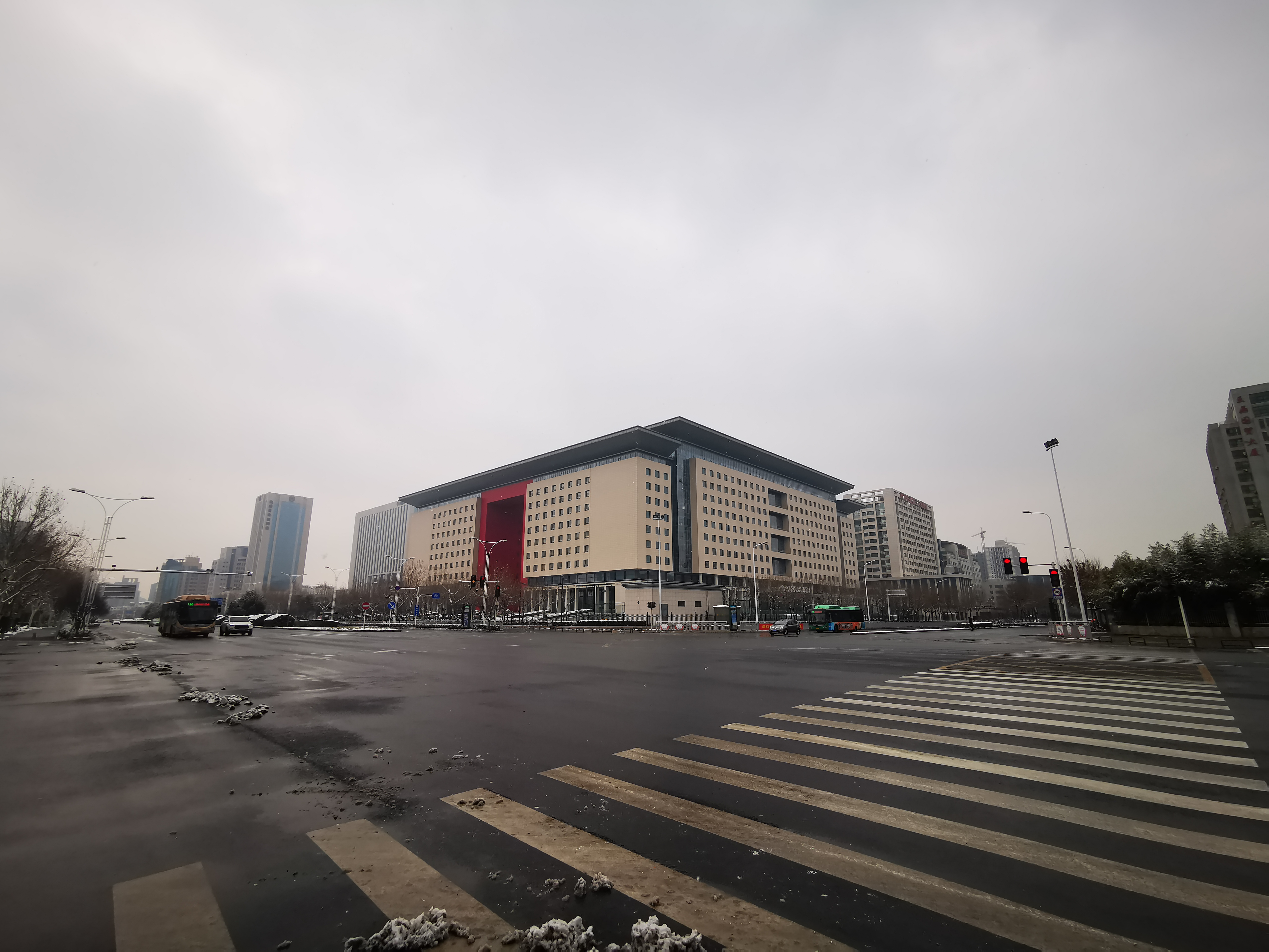 中文（中国大陆）: 郑东新区省直机关综合办公楼